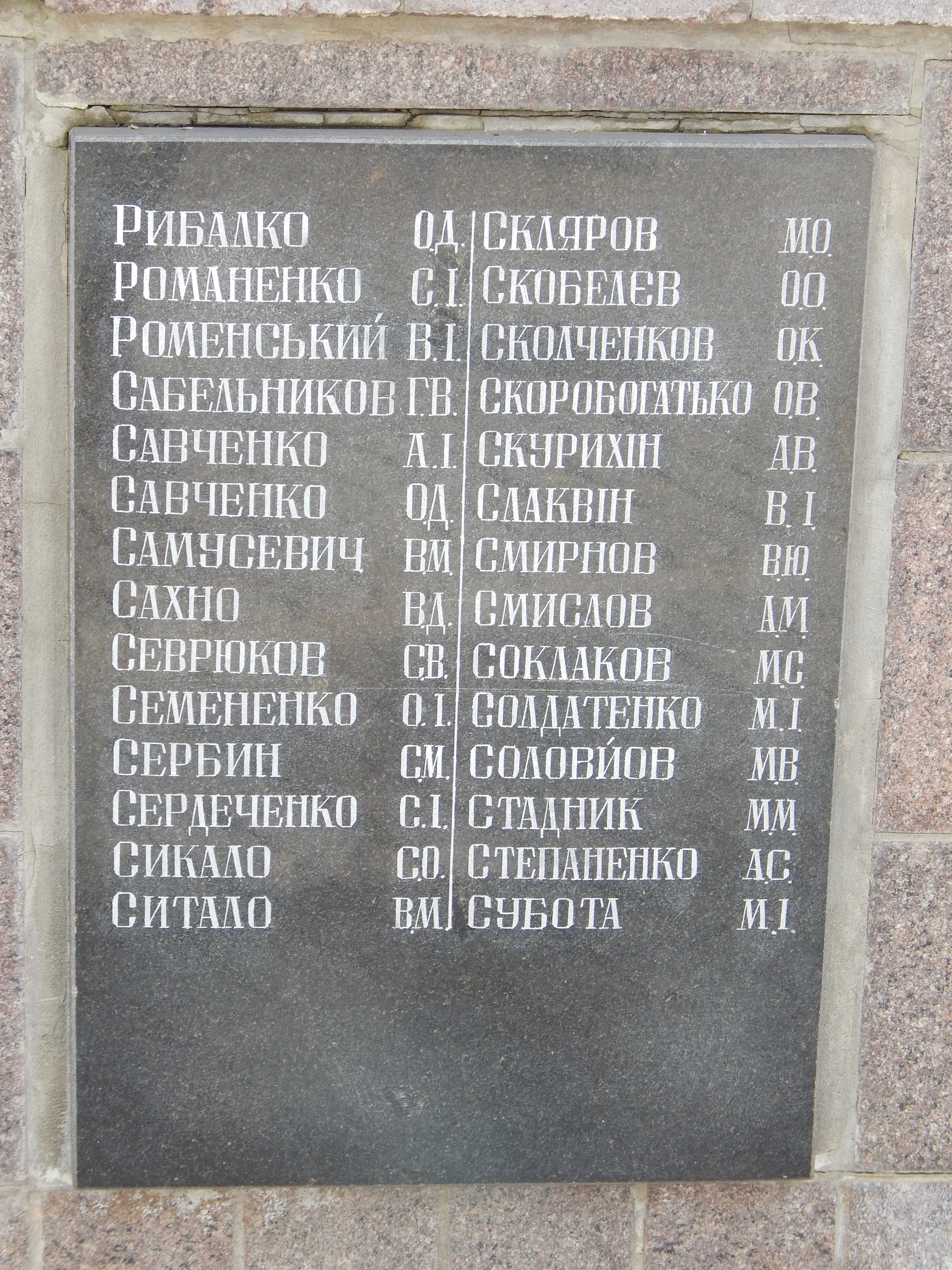 Пам'ятник воїнам, які загинули в Афганістані, Харків, вул. Культури, сквер